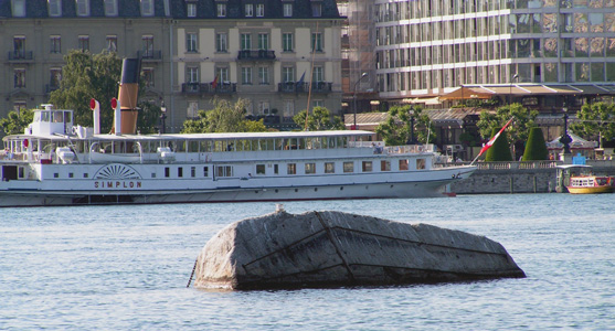 Les Pierres du Niton dans la Rade de Genève, Geneva - Switzerland.